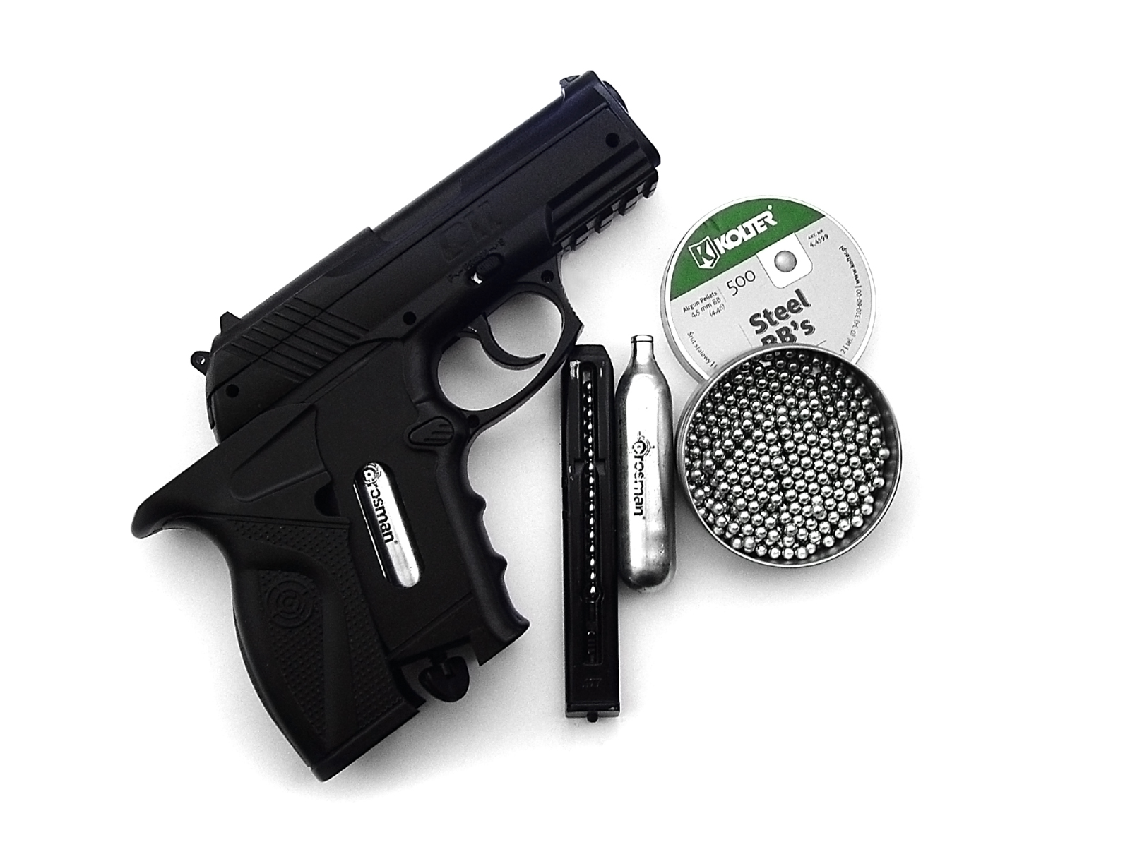 Wiatrówka Crosman C11, naboje CO2 oraz stalowy śrut.